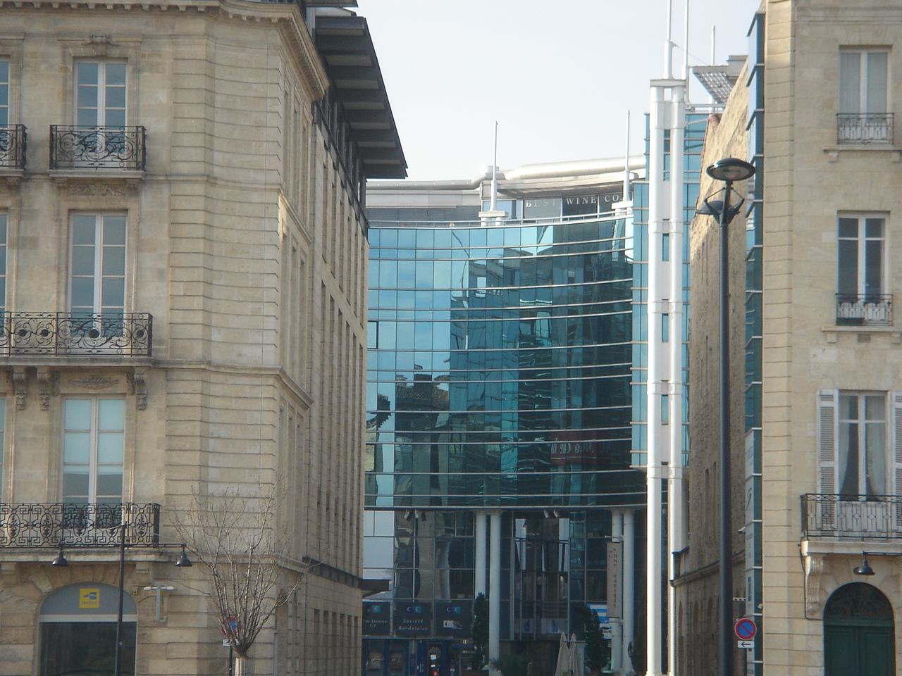 Die Cité Mondiale du Vin am Quai des Chartrons in Bordeaux (Frankreich).